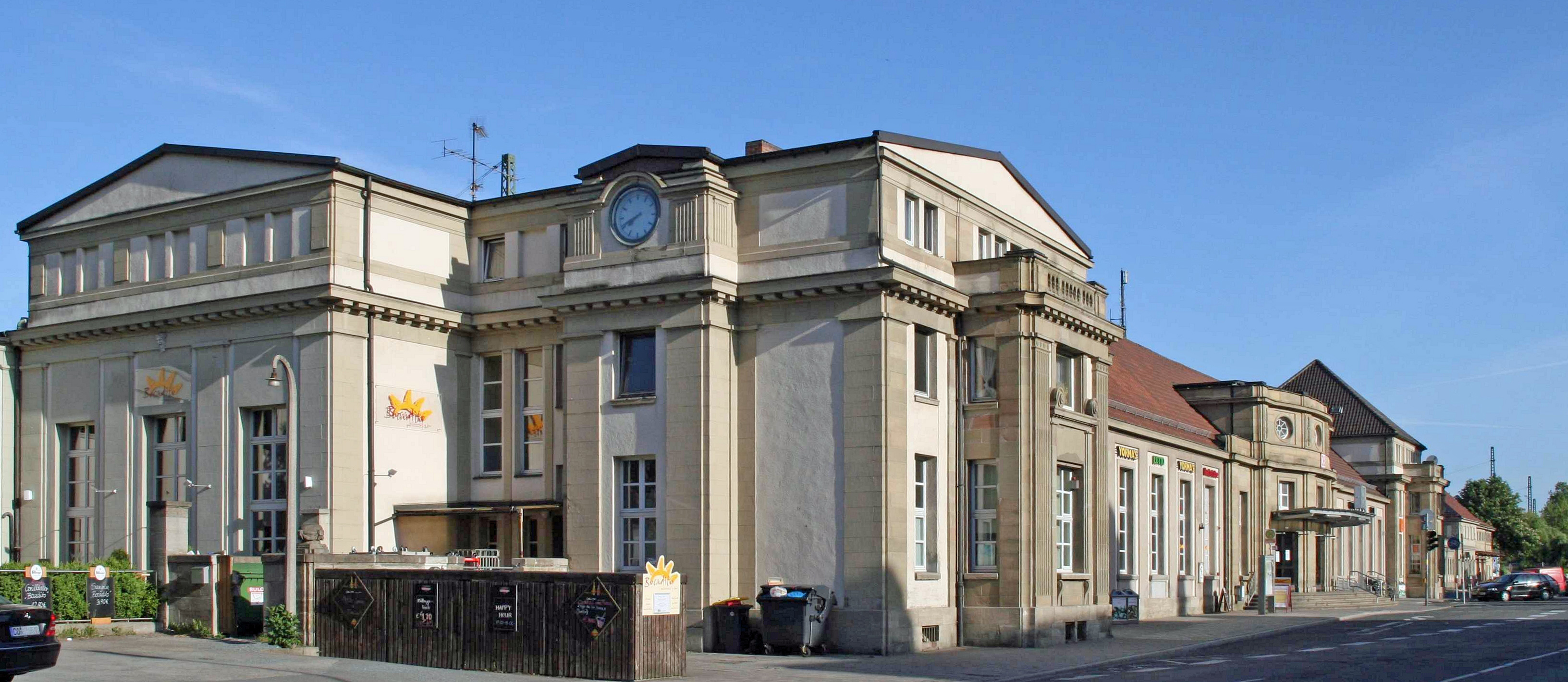 Personenbahnhof, Coburg